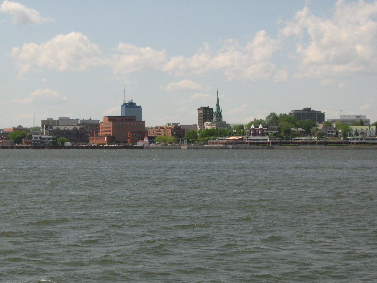 Centre-ville de Trois-Rivières vue du fleuve Saint-Laurent